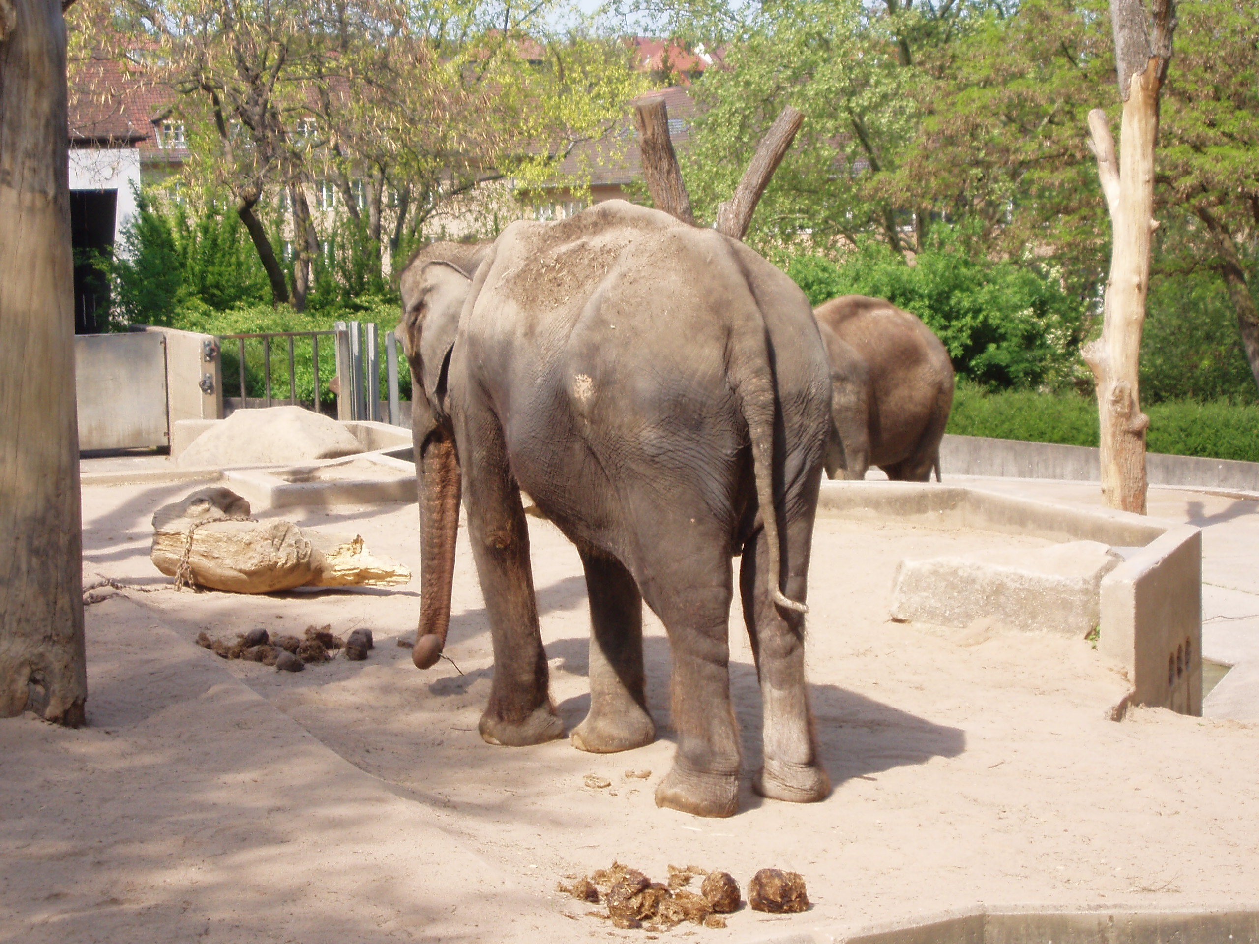 Vilja, der älteste Elefant Europas, im April 2007